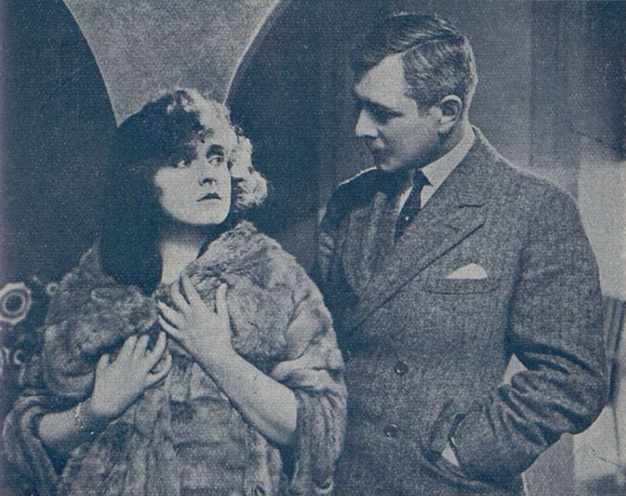 Loïs Mérédith (ou Lois Meredith) et Henri Debain dans Le Secret de Rosette Lambert - photo publicitaire (recadrée)